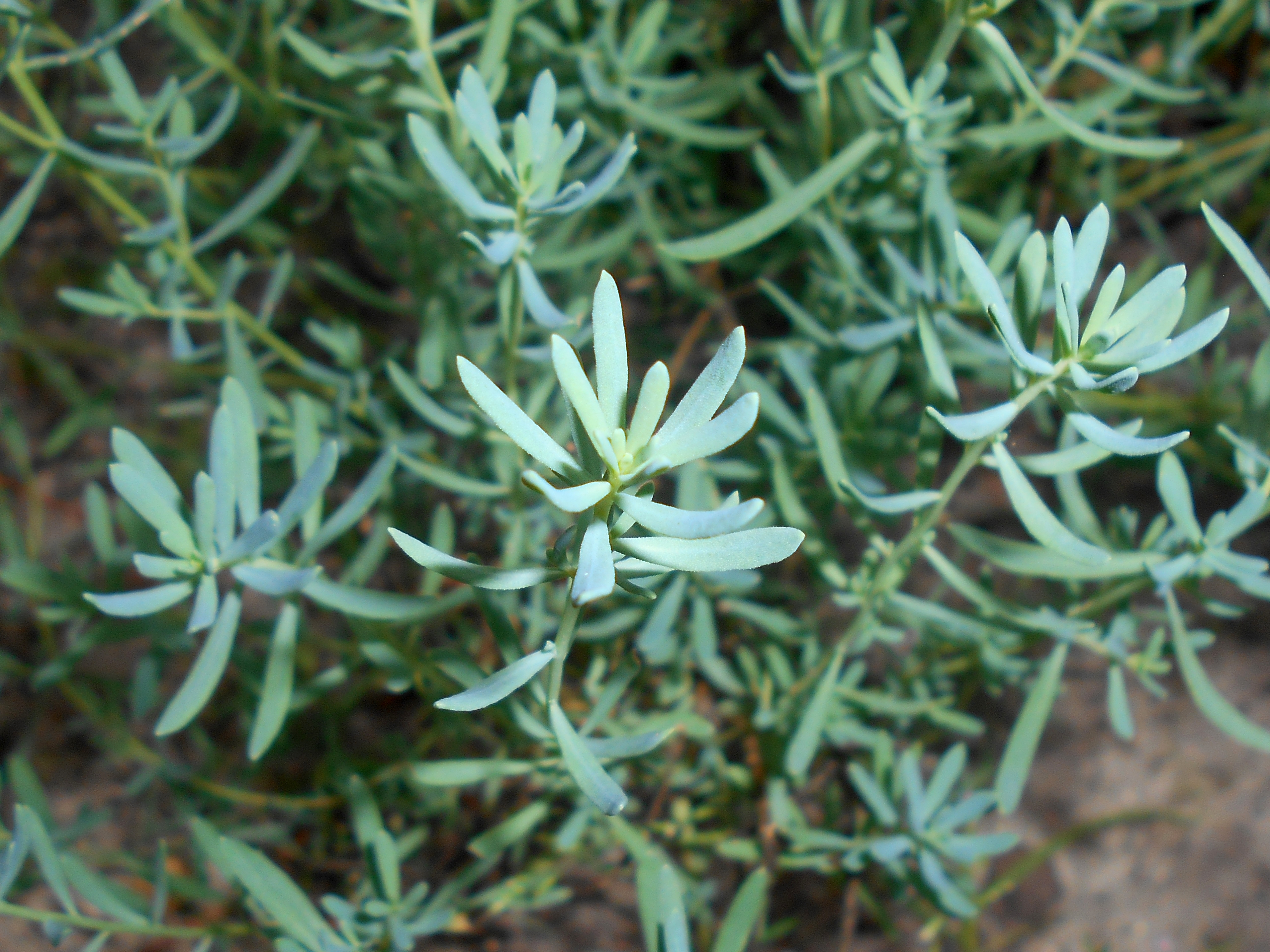 Skrzydlinka wielkokwiatowa (Aethionema grandiforum), Arboretum w Rogowie.